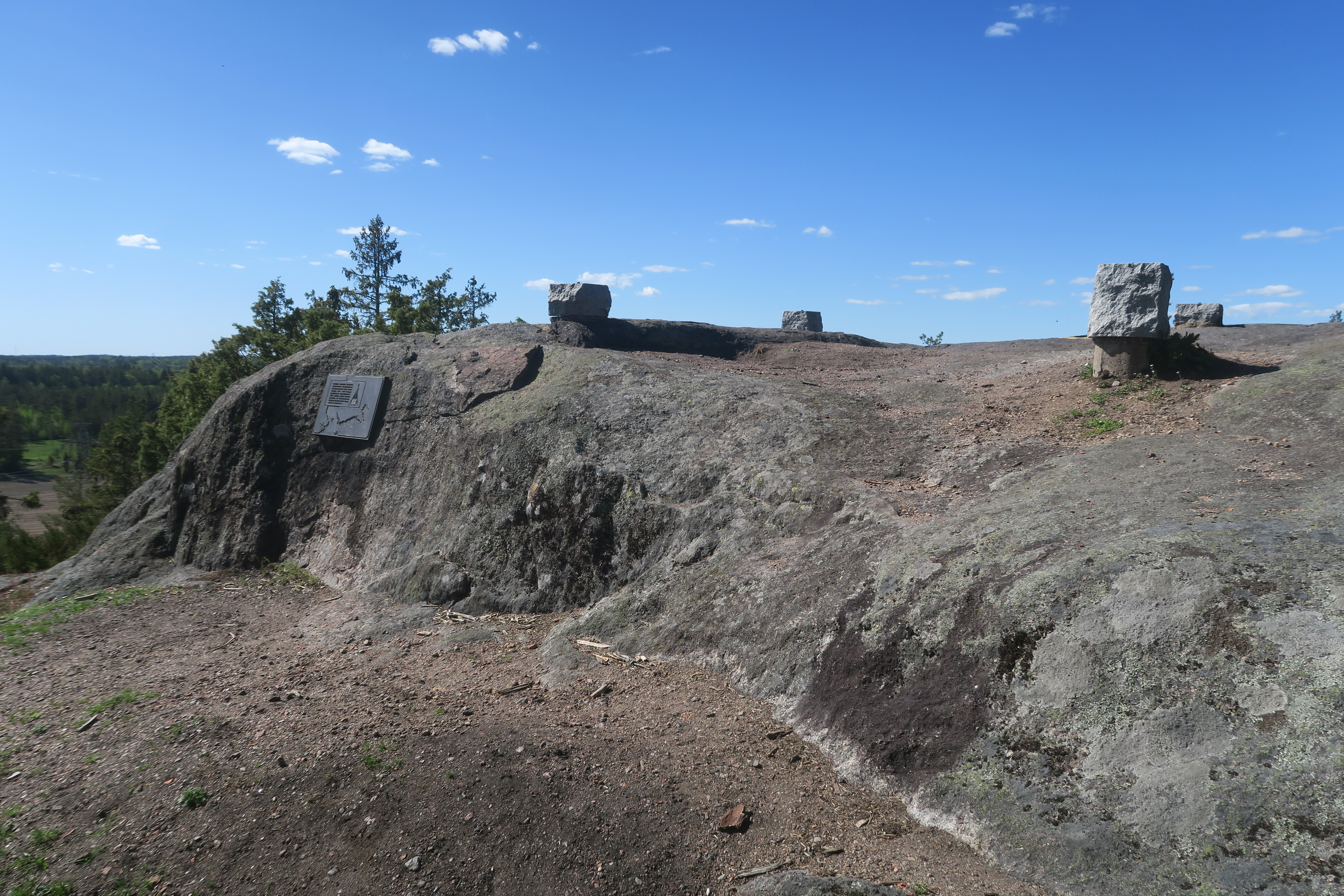 Krimin sodan (1854-55) aikaisen optisen lennätinaseman perustukset ja muistolaatta Raision Kuuvavuorella Varsinais-Suomessa Suomessa 30.5.2020